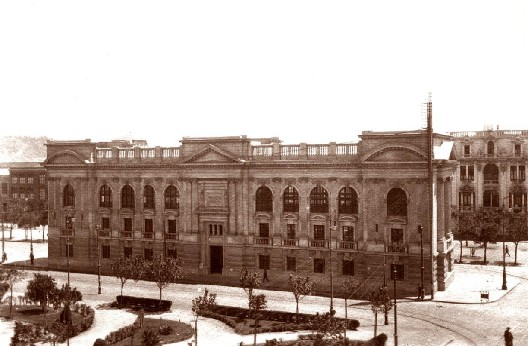 Biblioteca Pública Santiago Severín